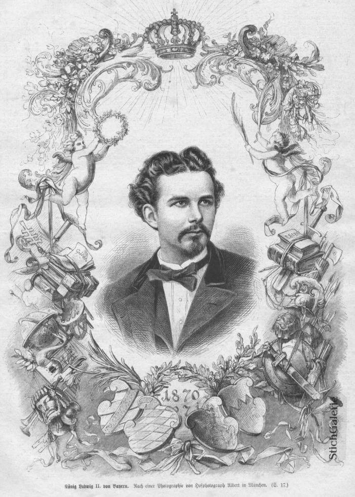 König Ludwig II. von Bayern, Stich von 1870